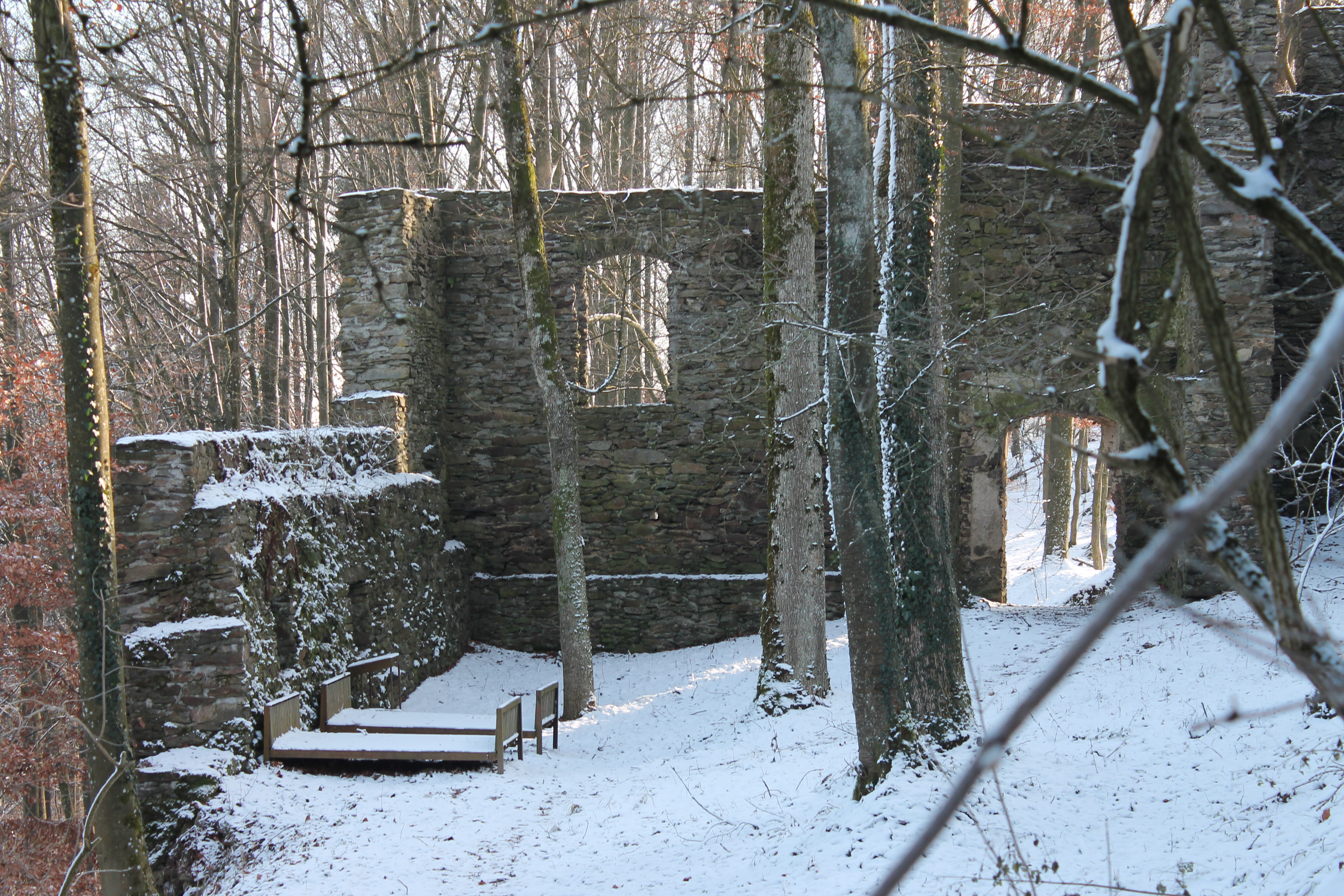 Westansicht der Vorburg